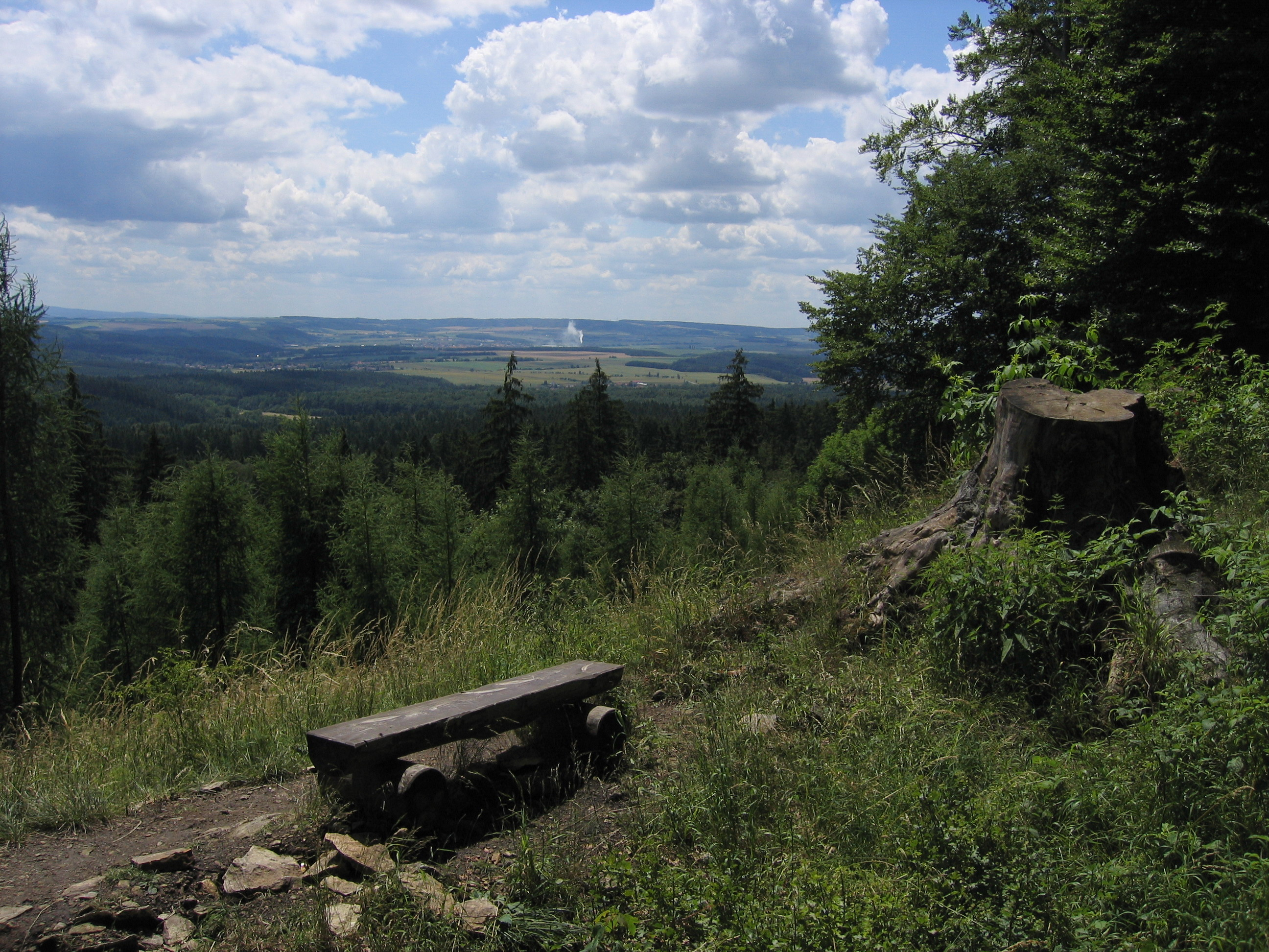 Louštín (CZ): Pohled z vyhlídky pod vrcholovou informační cedulí. Vlastní foto pořízené dne 6.7.2005.